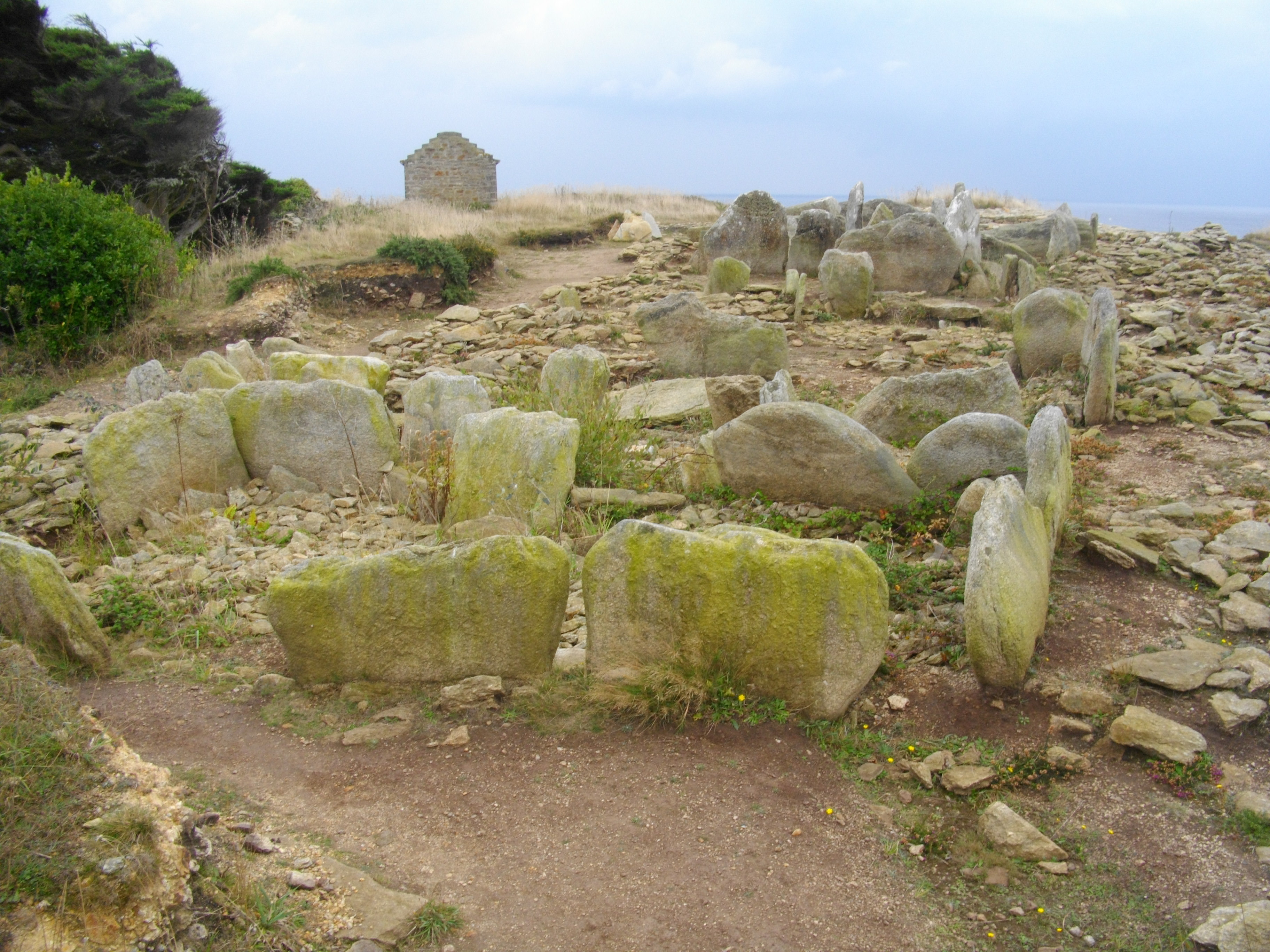 Dolmens de la pointe du Souc'h (Plouhinec-Finistère)